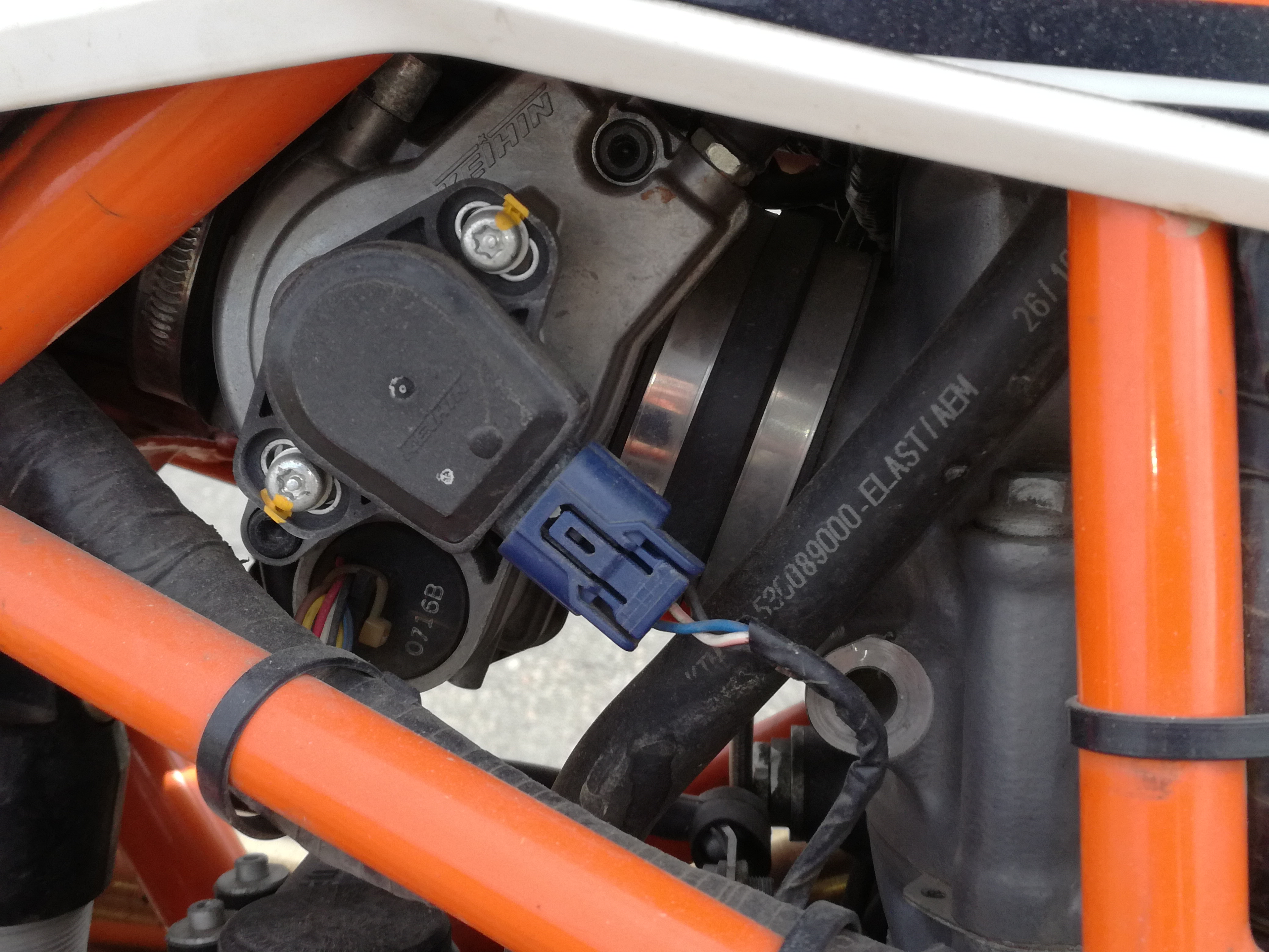 DkK im eingebautem Zustand